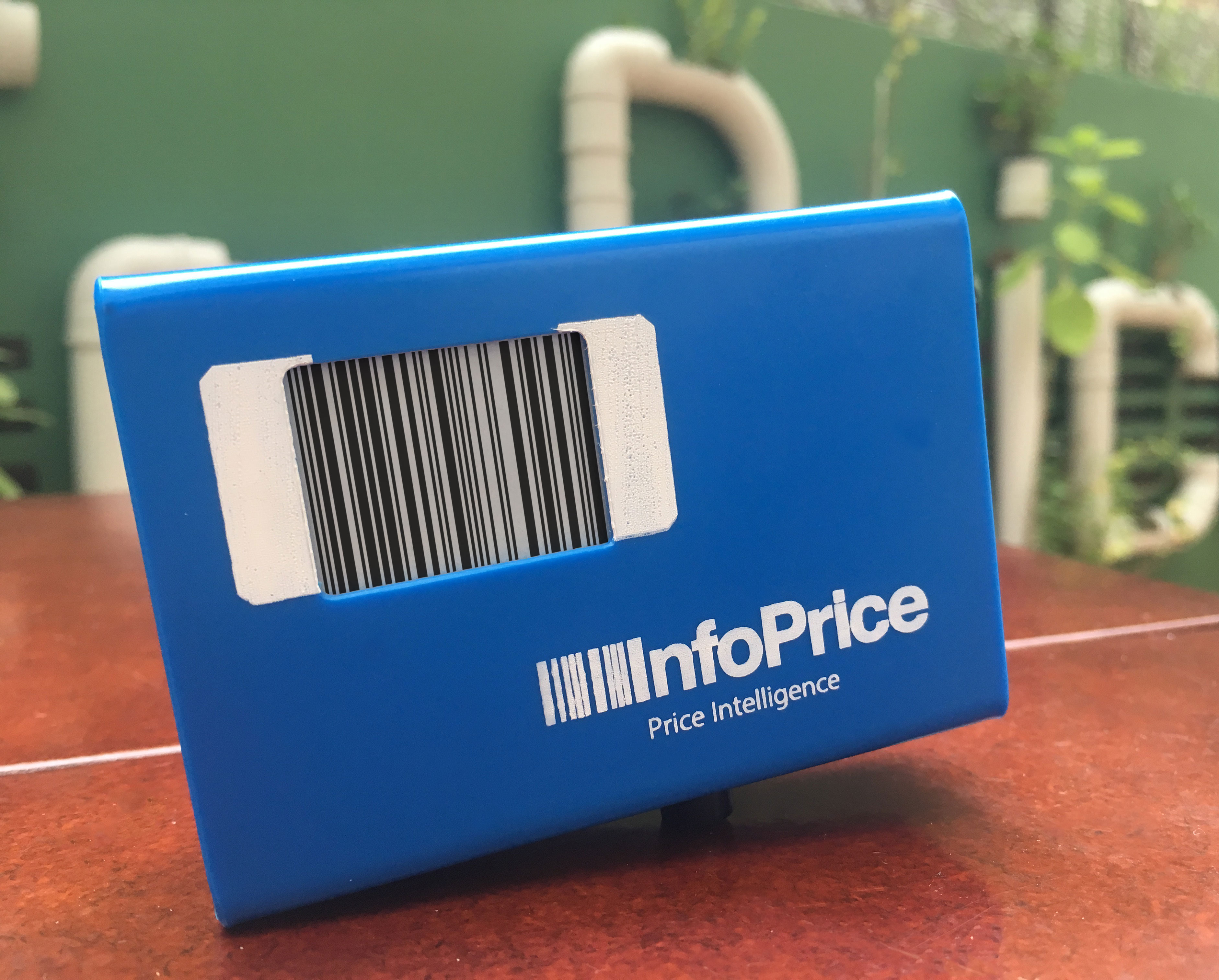 Foto do SmartPrice, hardware patenteado criado pela InfoPrice